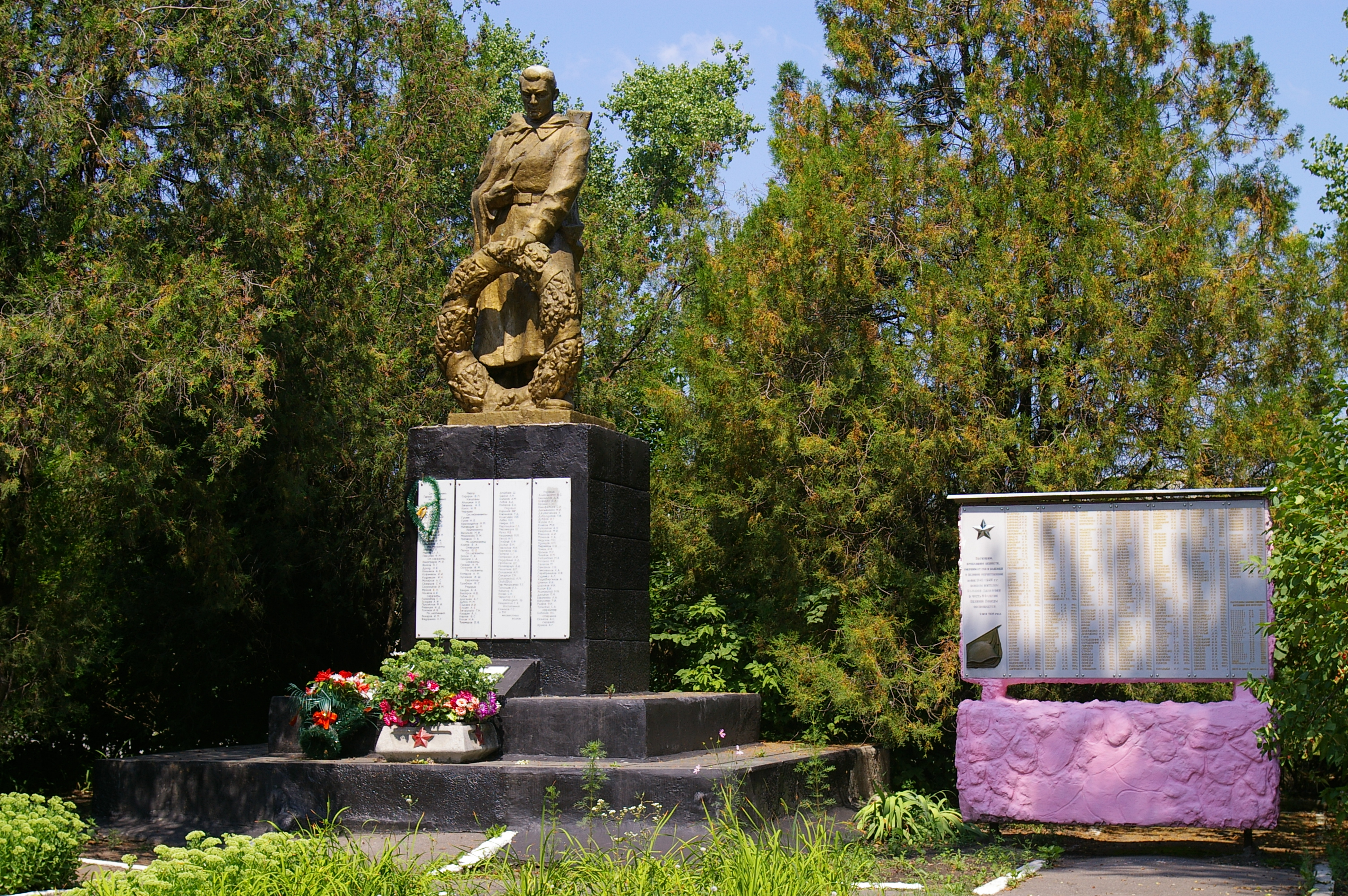 Харьков. Памятник павшим советским воинам в Большой Даниловке.